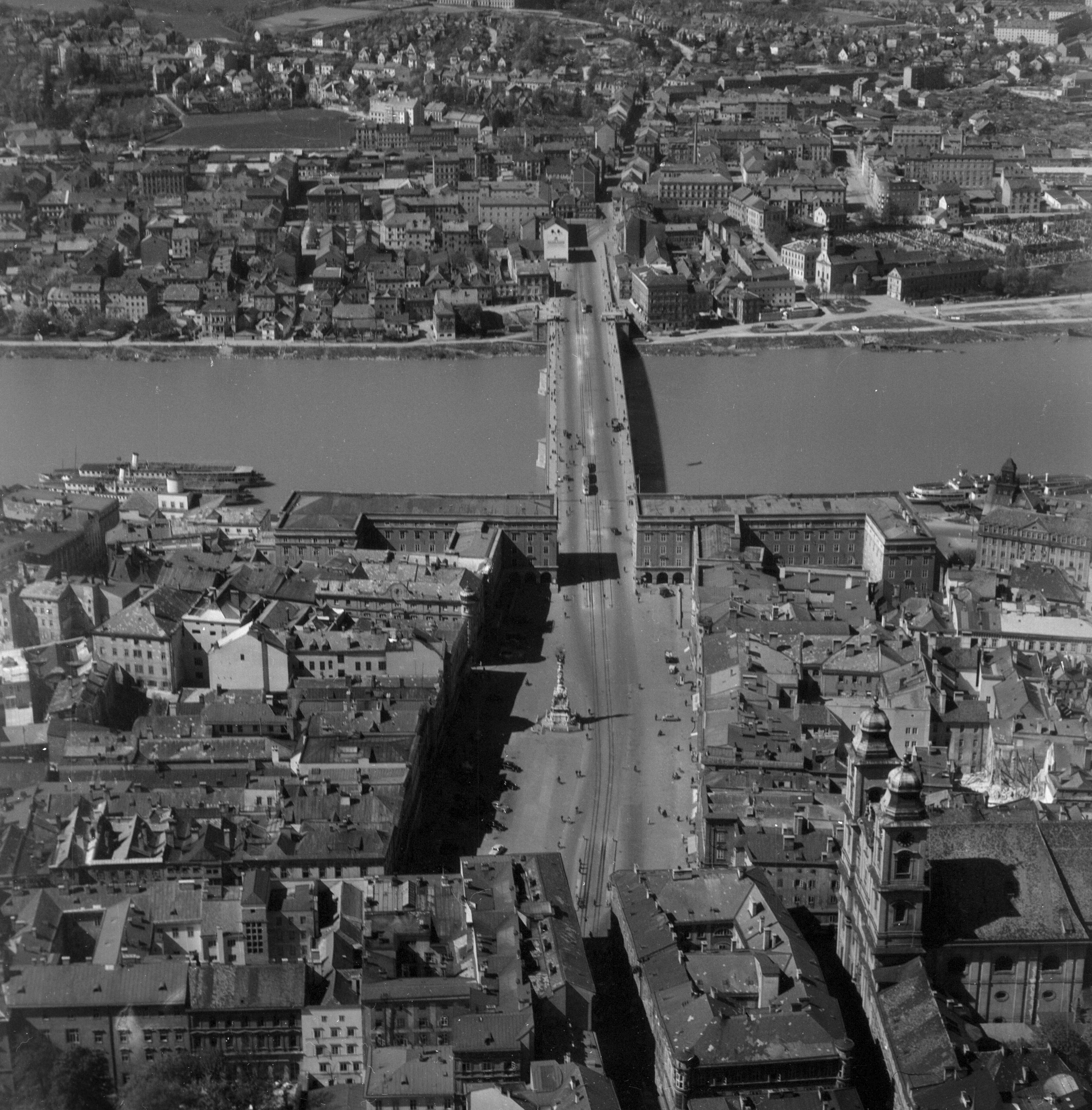 Luftbild der Linzer Innenstadt mit dem Hauptplatz und Urfahr von Süden.